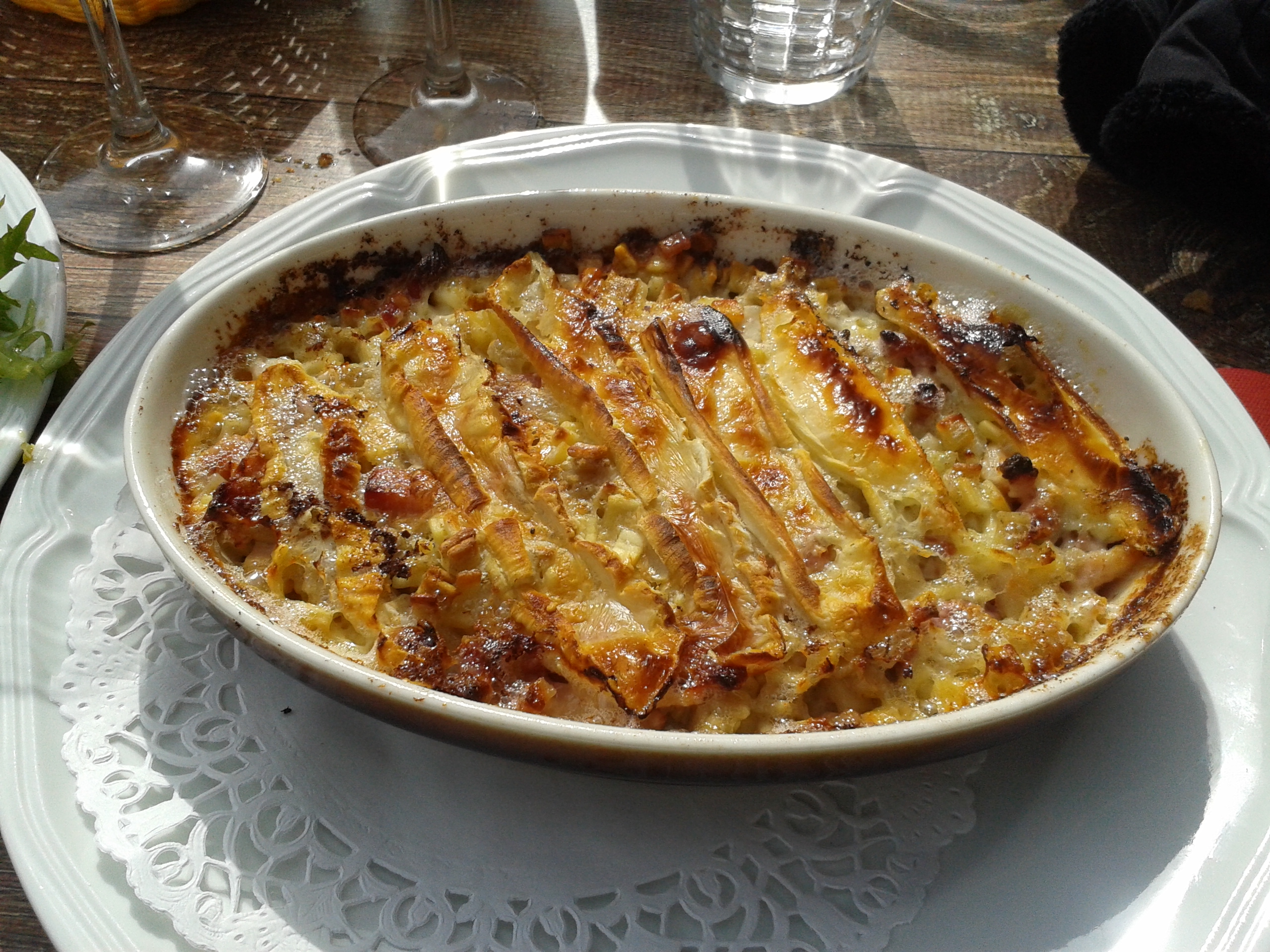 Plat de croziflette, restaurant de l'Altiport, Courchevel.